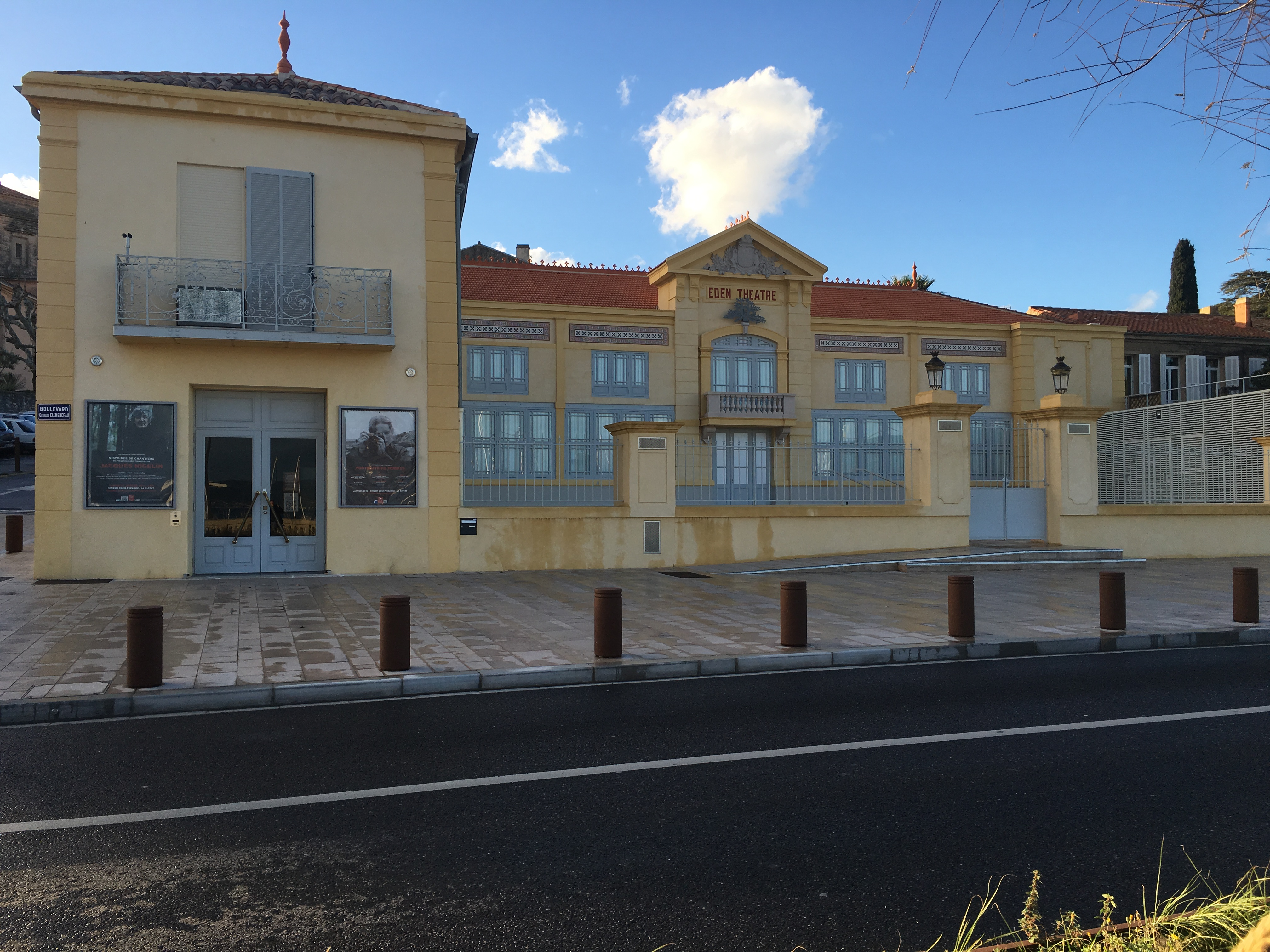 Cinéma l'Eden Théâtre à La Ciotat, 11 janvier 2016.